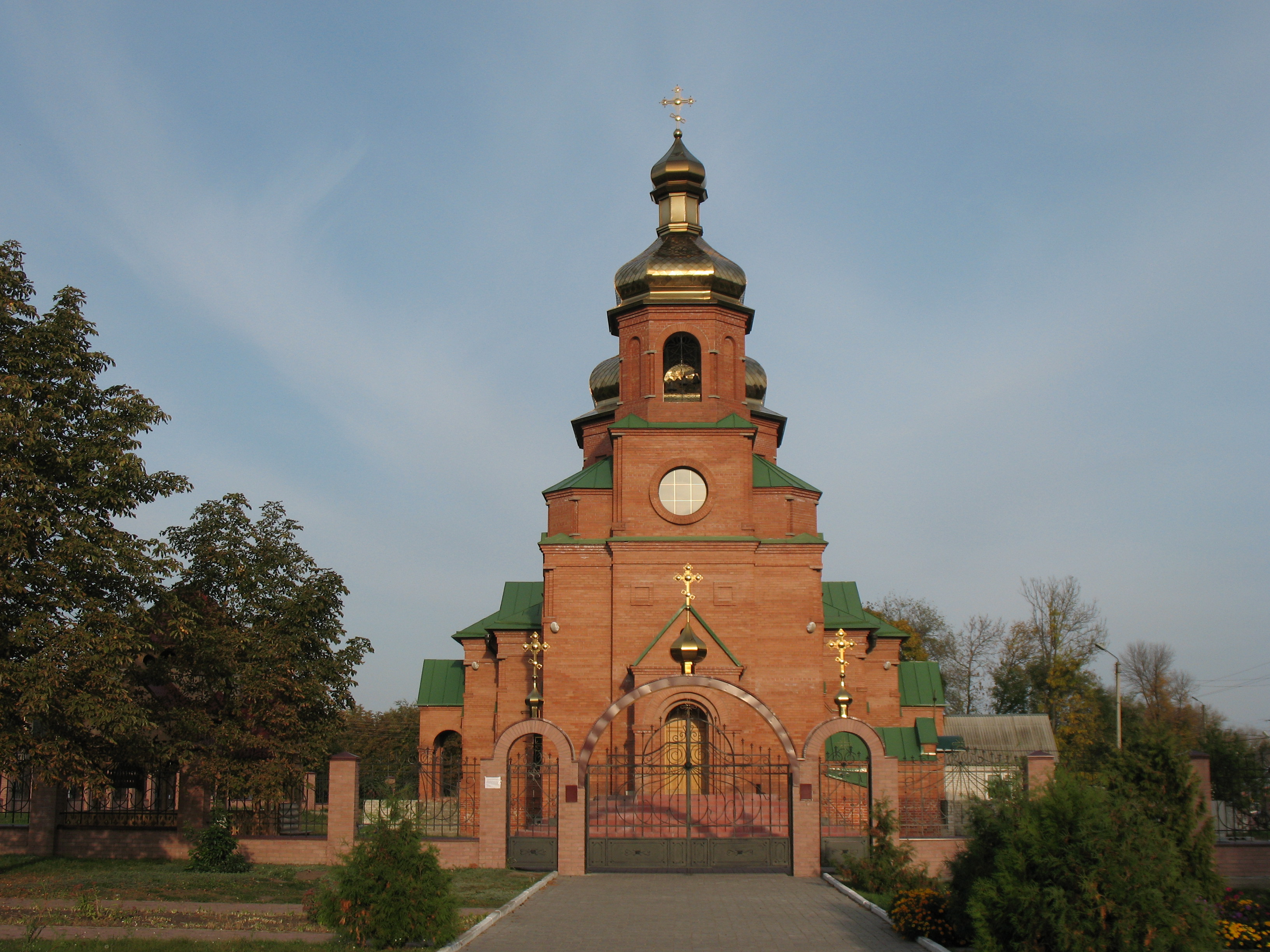 Город Волчанск Харьковской области. Православный храм.